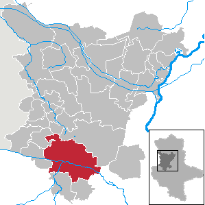 Oschersleben in Saxony-Anhalt (Country) - District (Landkreis) Börde